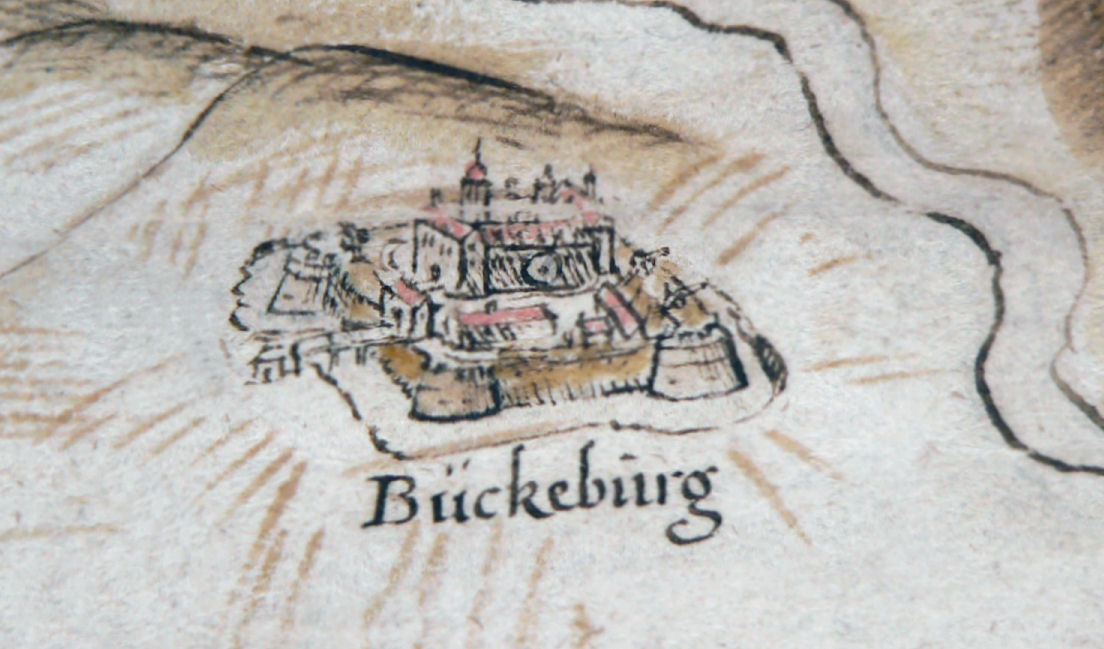 Belagerung Bückeburg in Stiftsfehde